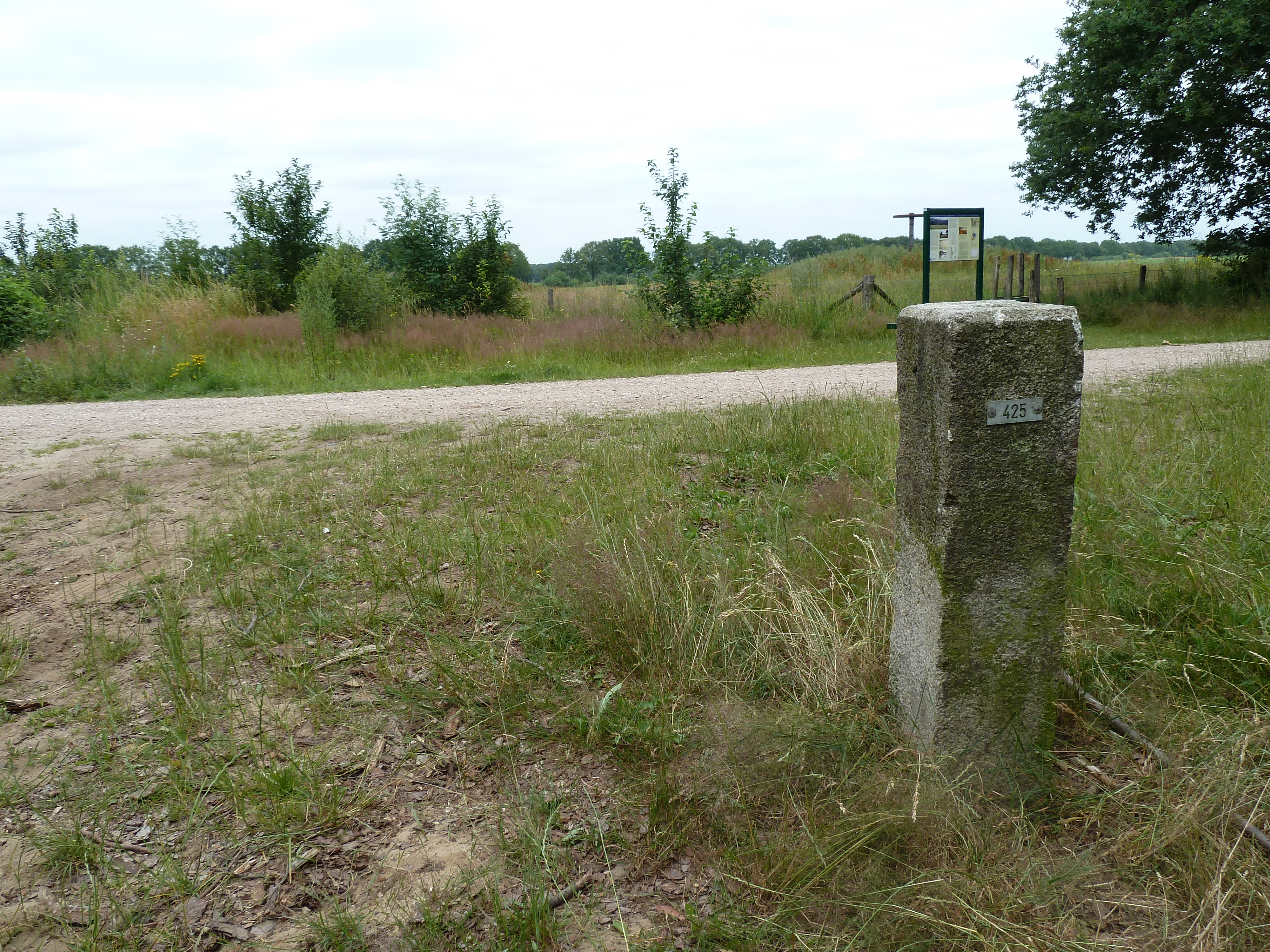 Grietjens Gericht, Beesel, Limburg, Nederland